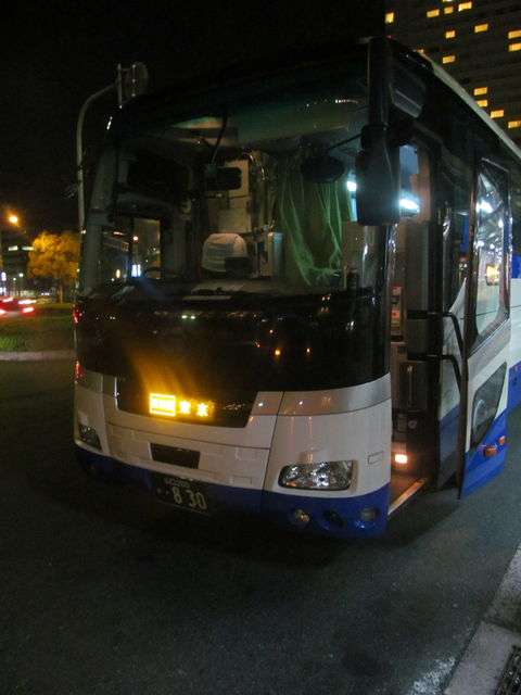 中国ＪＲバス 641-2905 東京特別便 東京新木場行